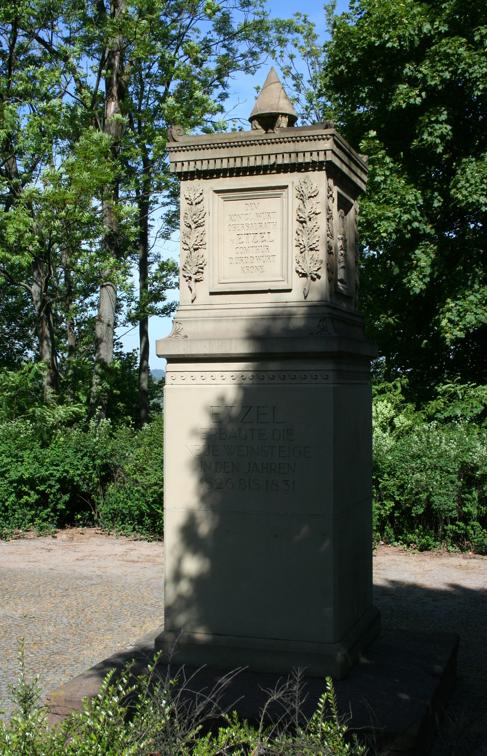 Denkmal für den Erbauer der Neuen Weinsteige Oberbaurat von Etzel an der Neuen Weinsteige in Stuttgart-Süd. Gemäß Denkmalliste der Stadt Stuttgart von 2008 als Kulturdenkmal eingestuft.